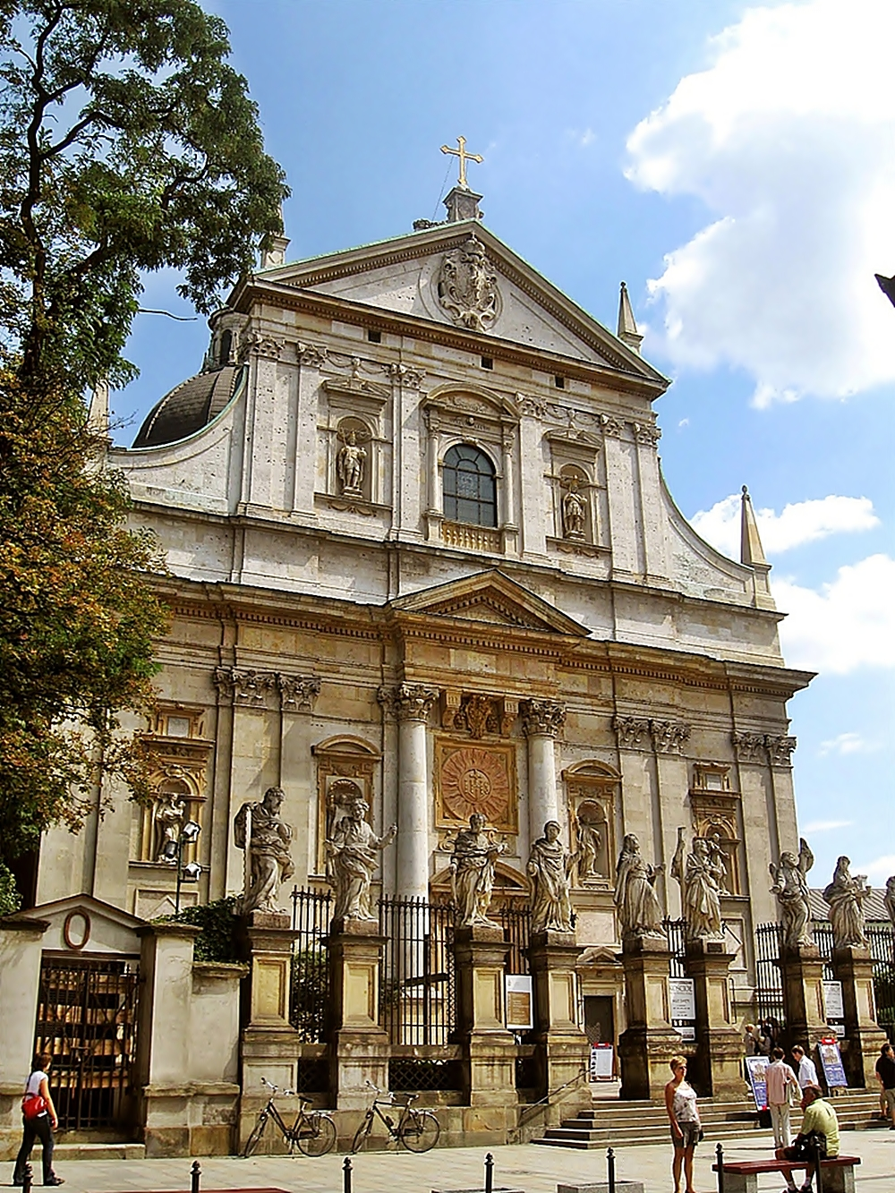 barokowy kościół